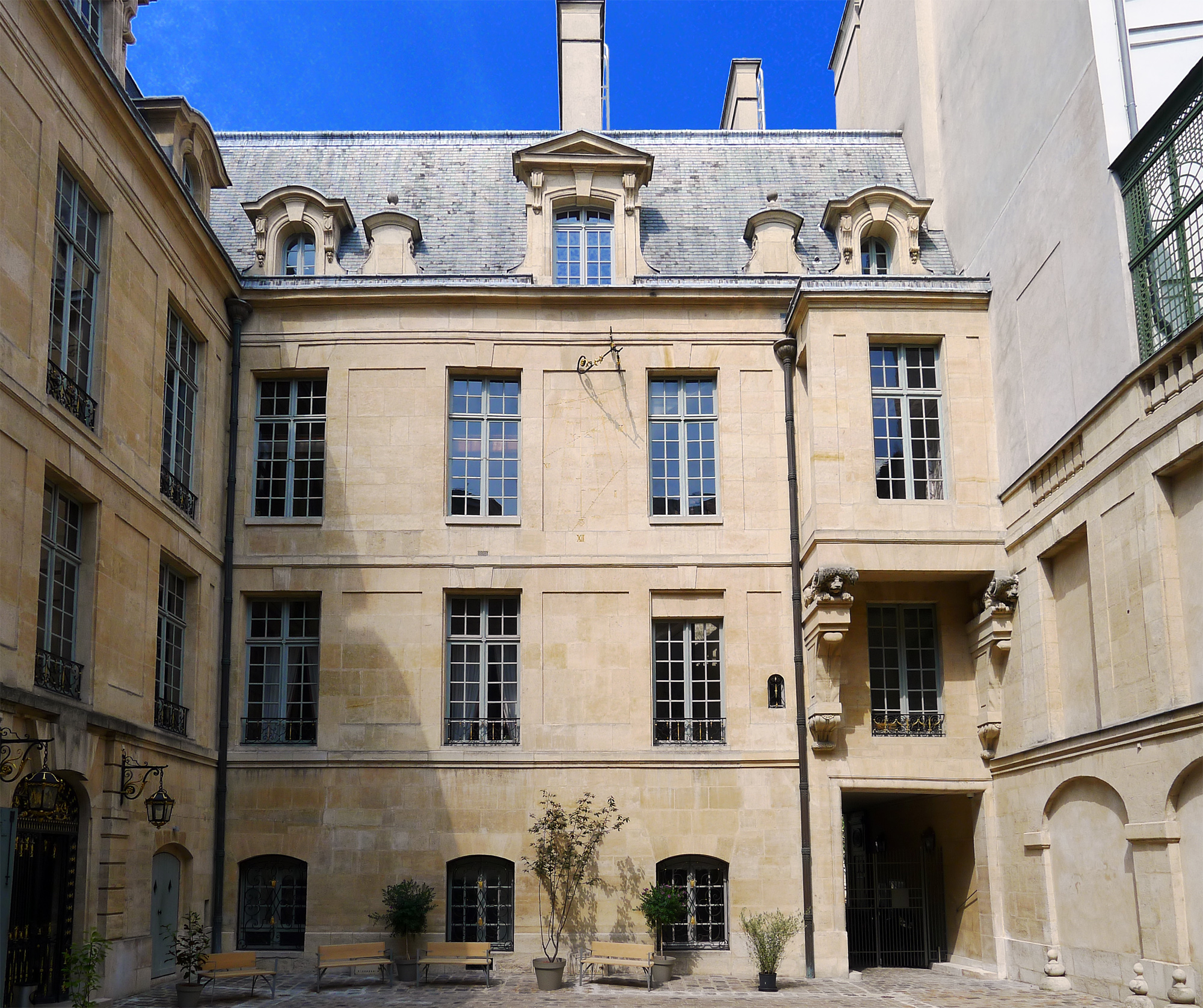 Hôtel de Lauzun, 17 quai d'Anjou - Paris IVFaçade intérieure du nord